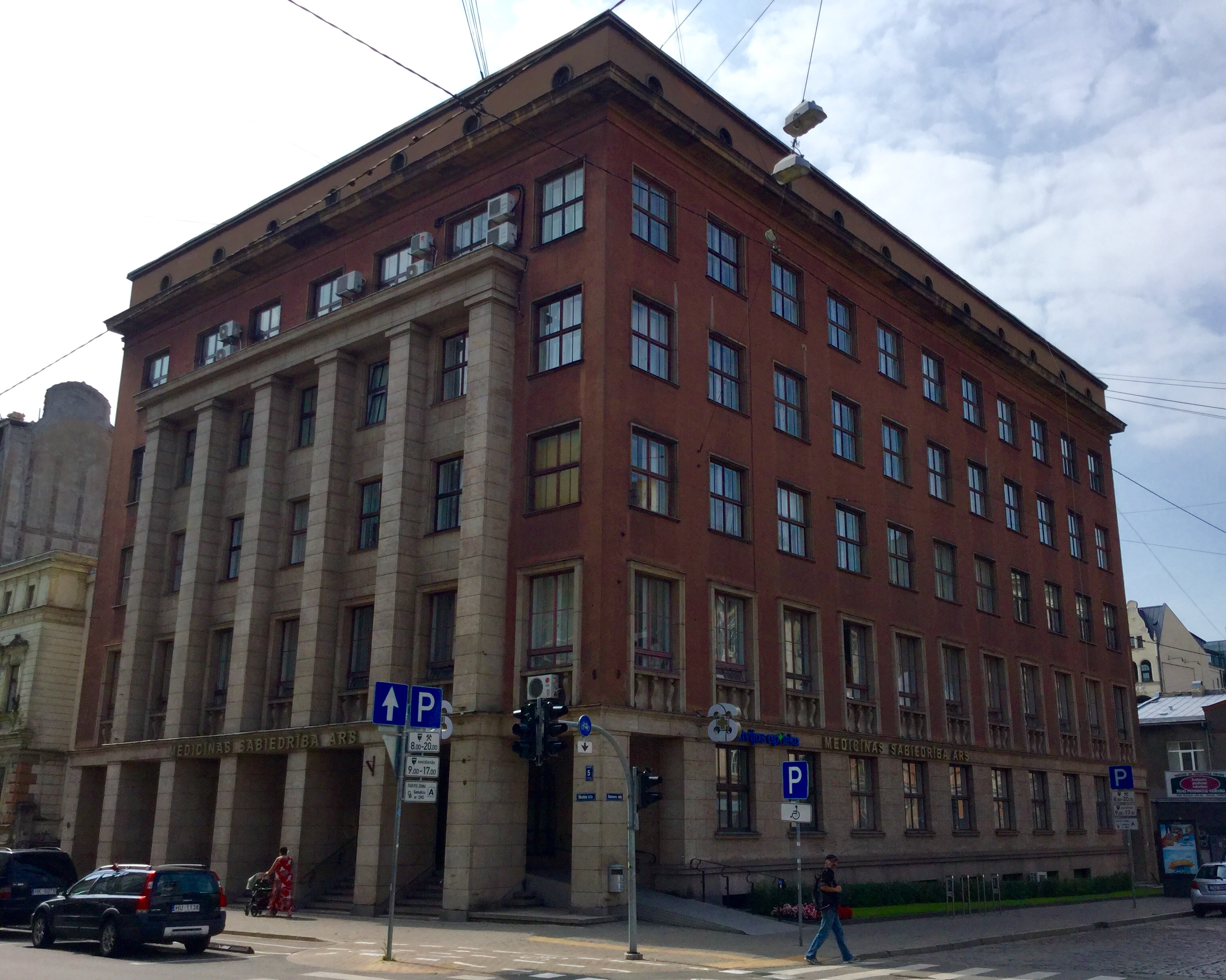 Administratīvā ēka, Rīga, Skolas iela 5